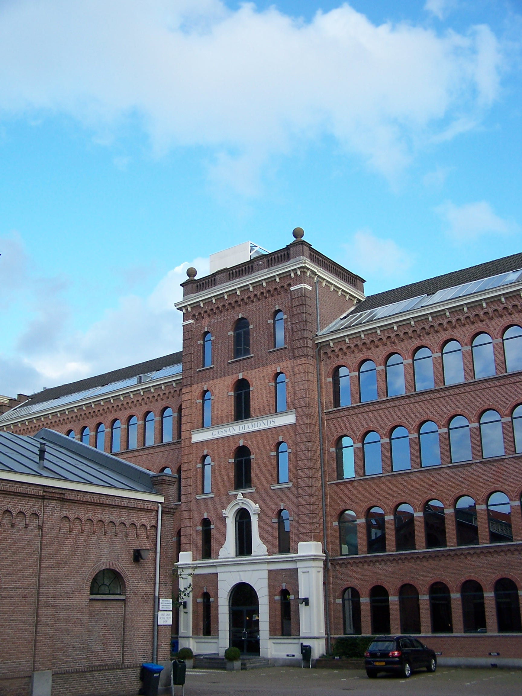 Nieuwe Uilenburgerstraat 173, main building, central part